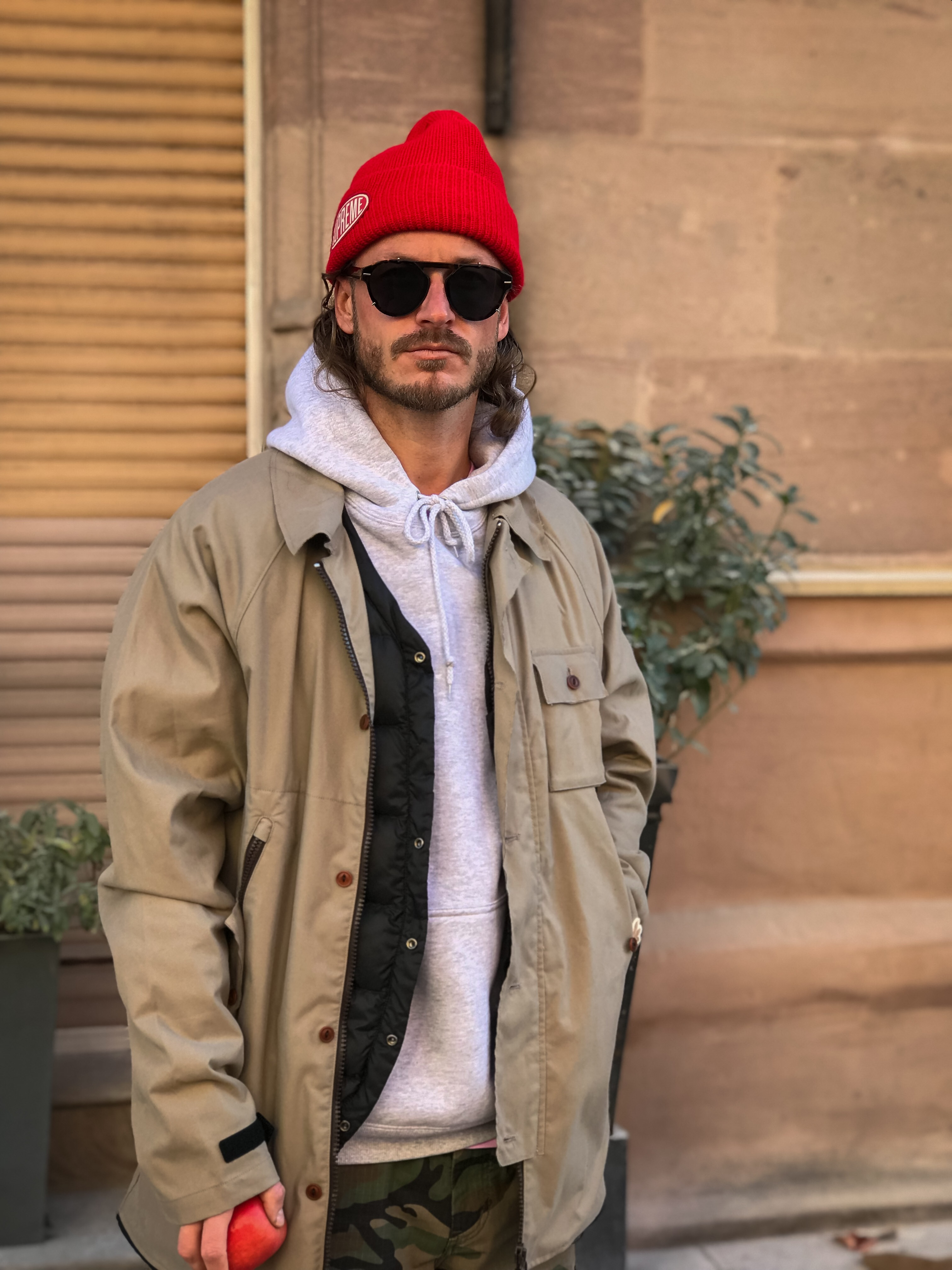 Till Jagla 2018 in Hamburg